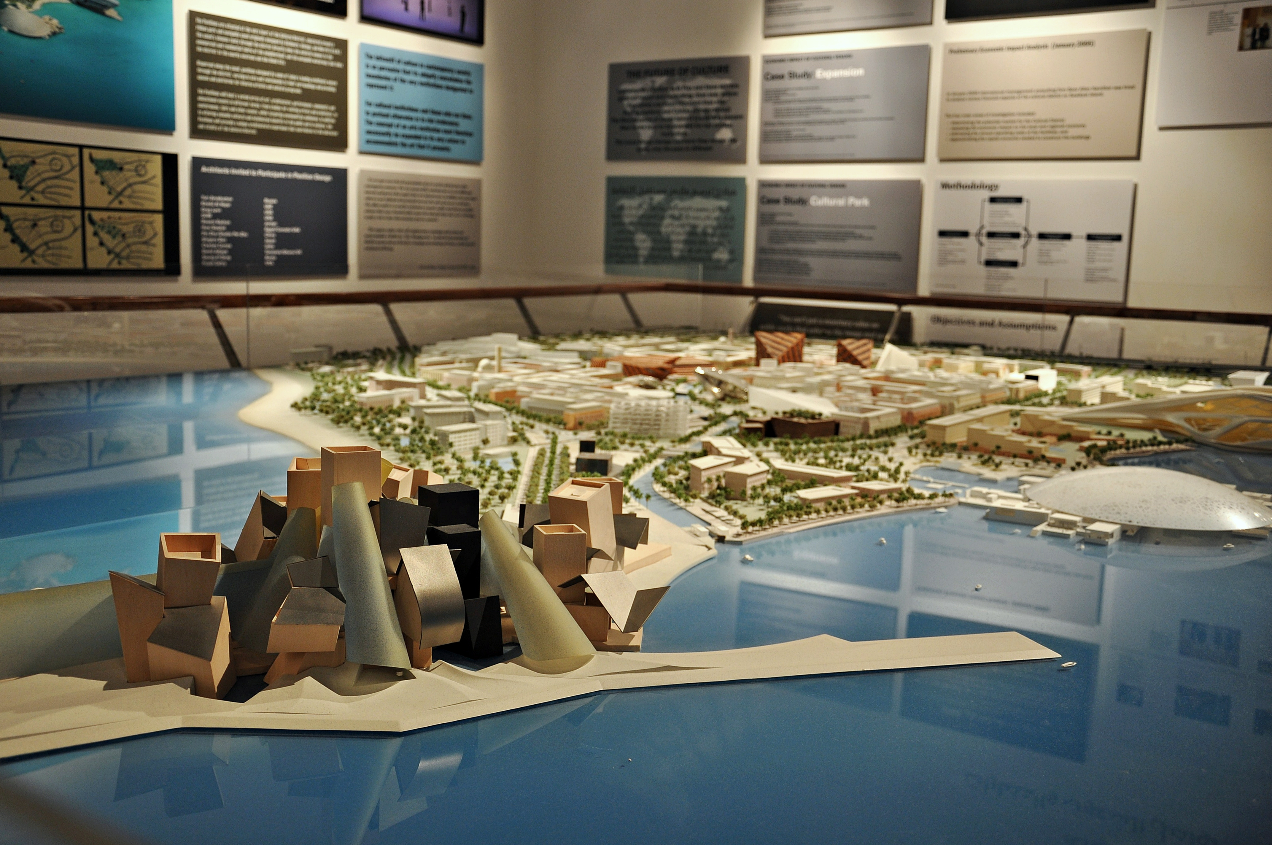 emiratos arabes